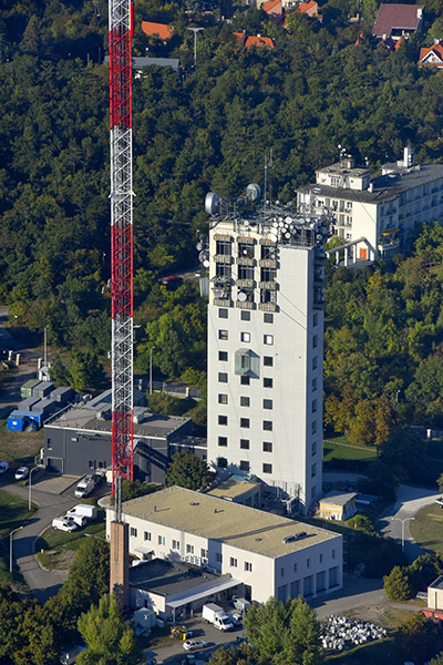 Az adótorony megújult épülete a magasból